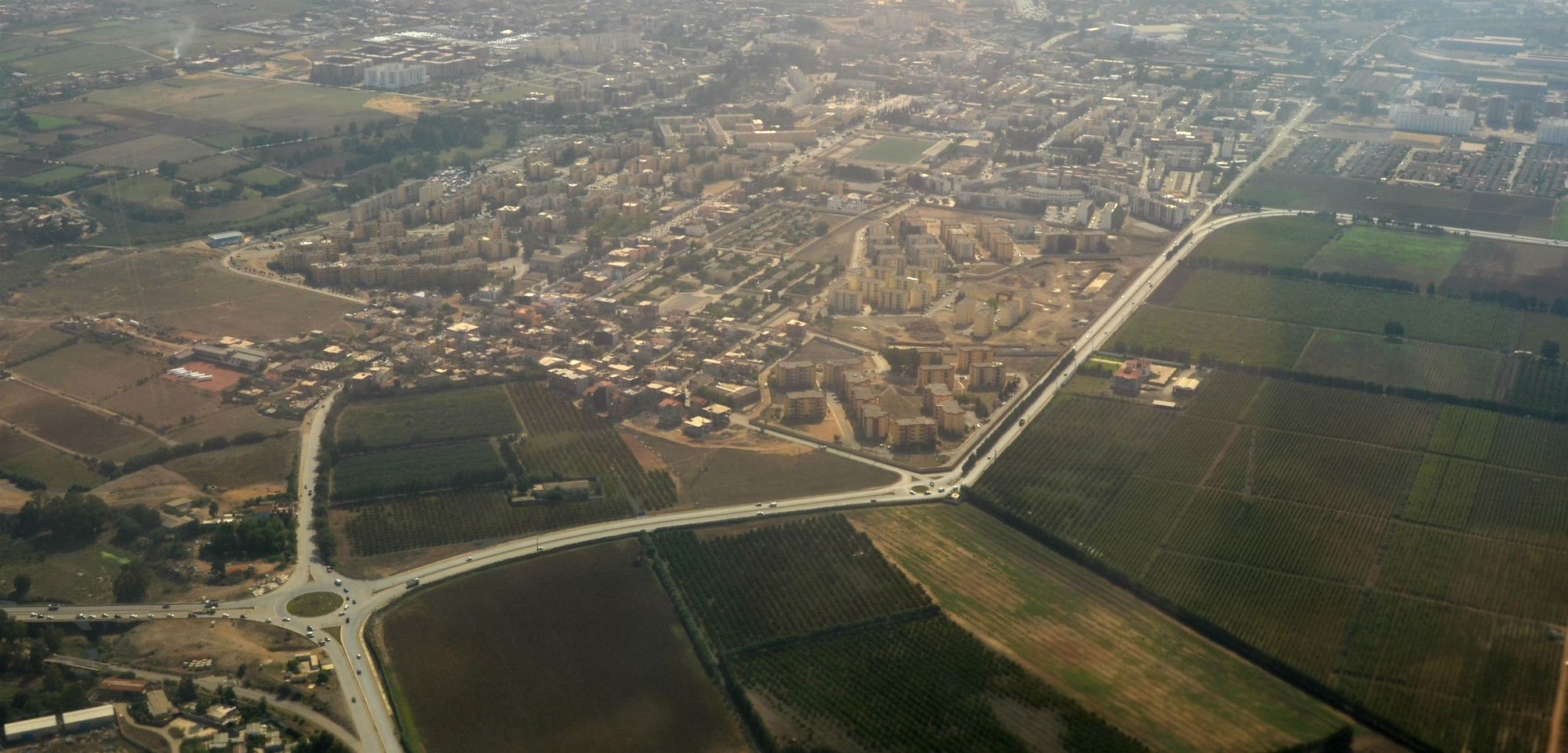 Vue aérienne de Reghaia depuis le nord